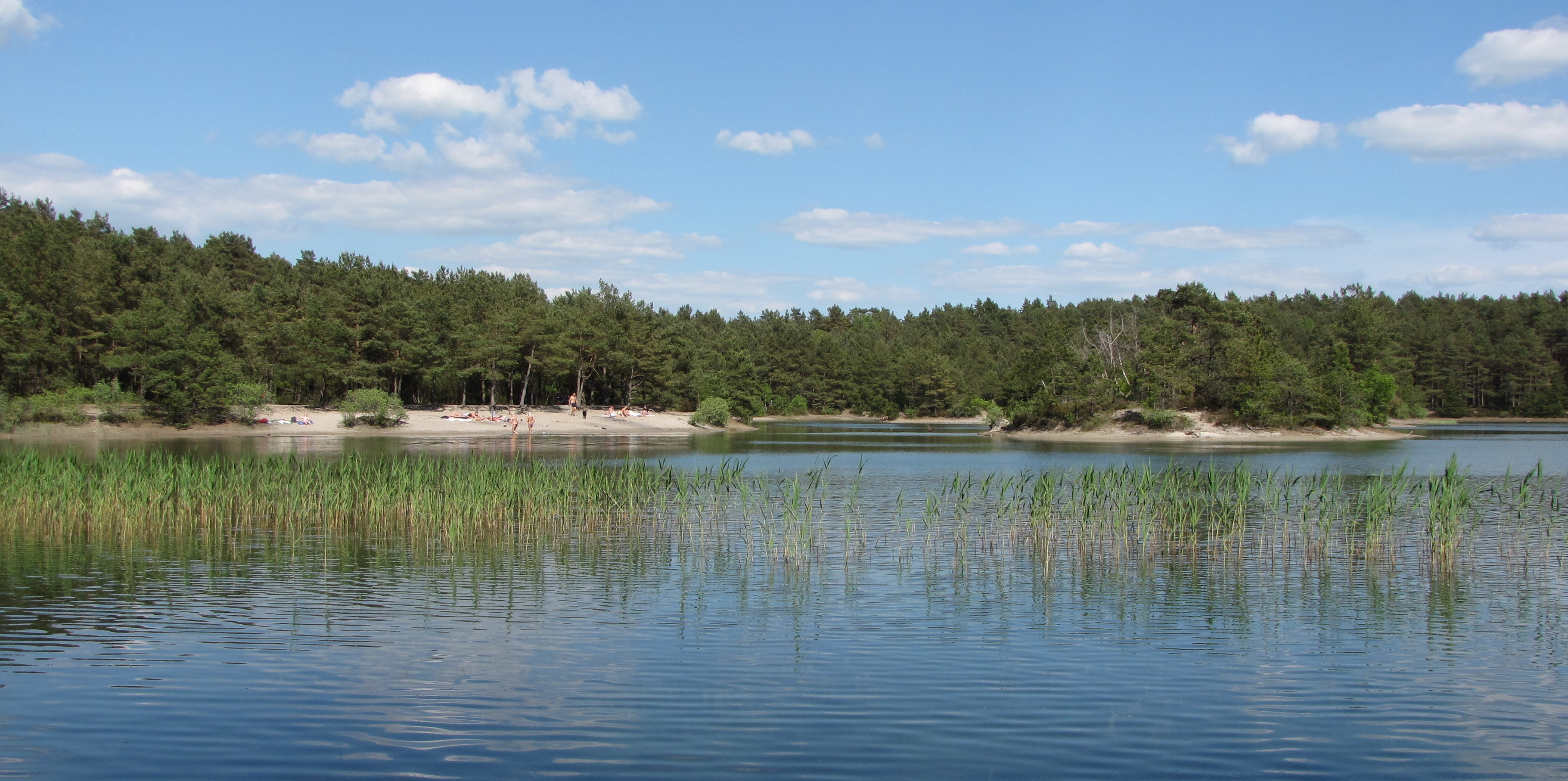 Schousbyes Sø ved Silkeborg er en kunstig sø på Haarup Sande øst for Silkeborg der er dannet i 1950'erne